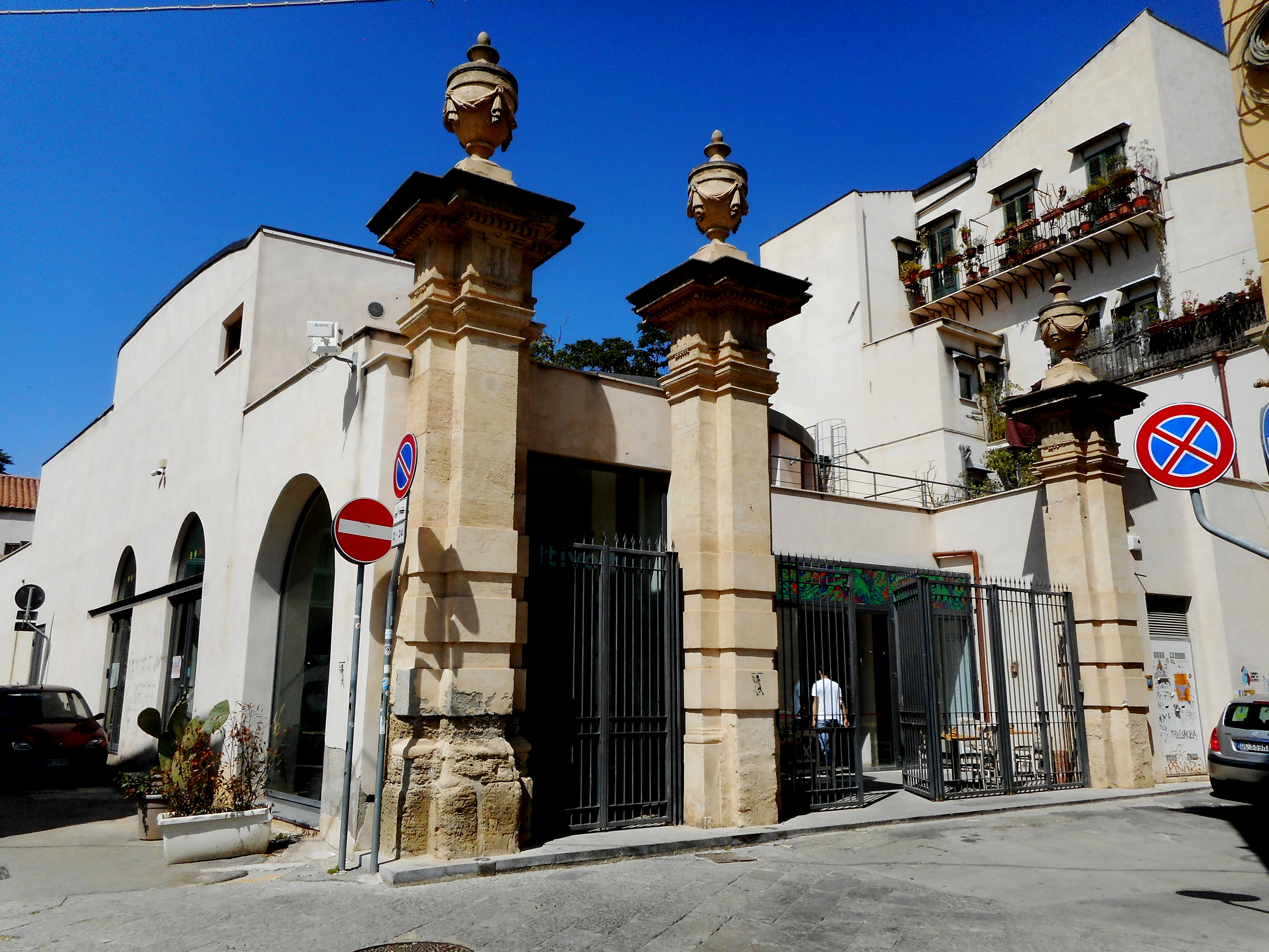 Ingresso del Teatro Garibaldi in via Castrofilippo